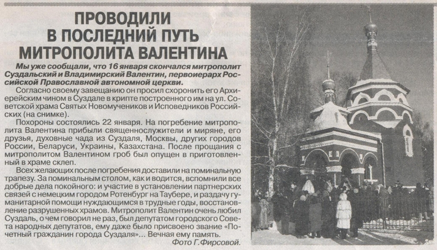 Статья из газеты по случаю смерти митрополита Валентина.